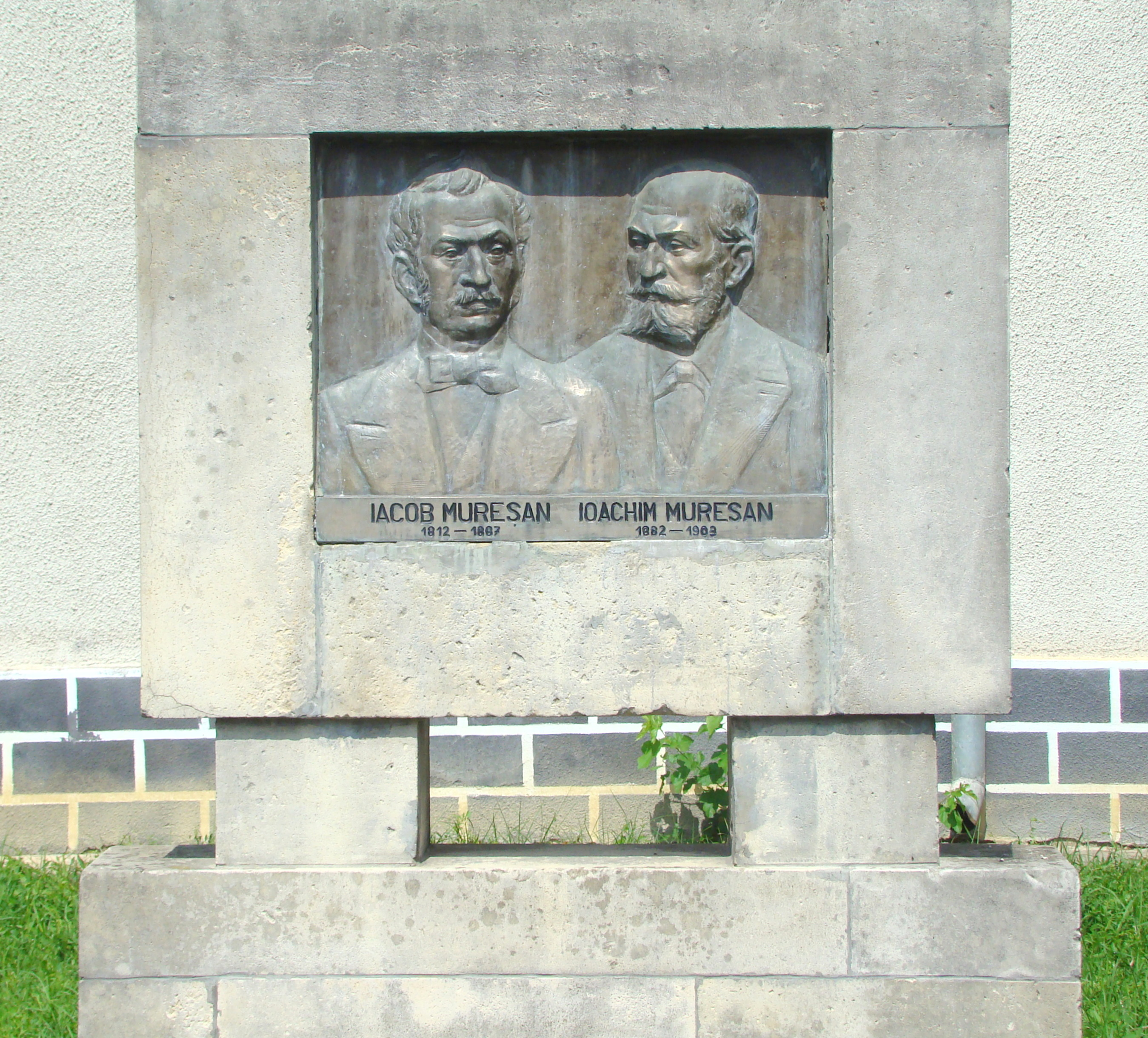 Relief de bronz închinat lui Iacob și Ioachim Mureșan, sat Rebrișoara; comuna Rebrișoara